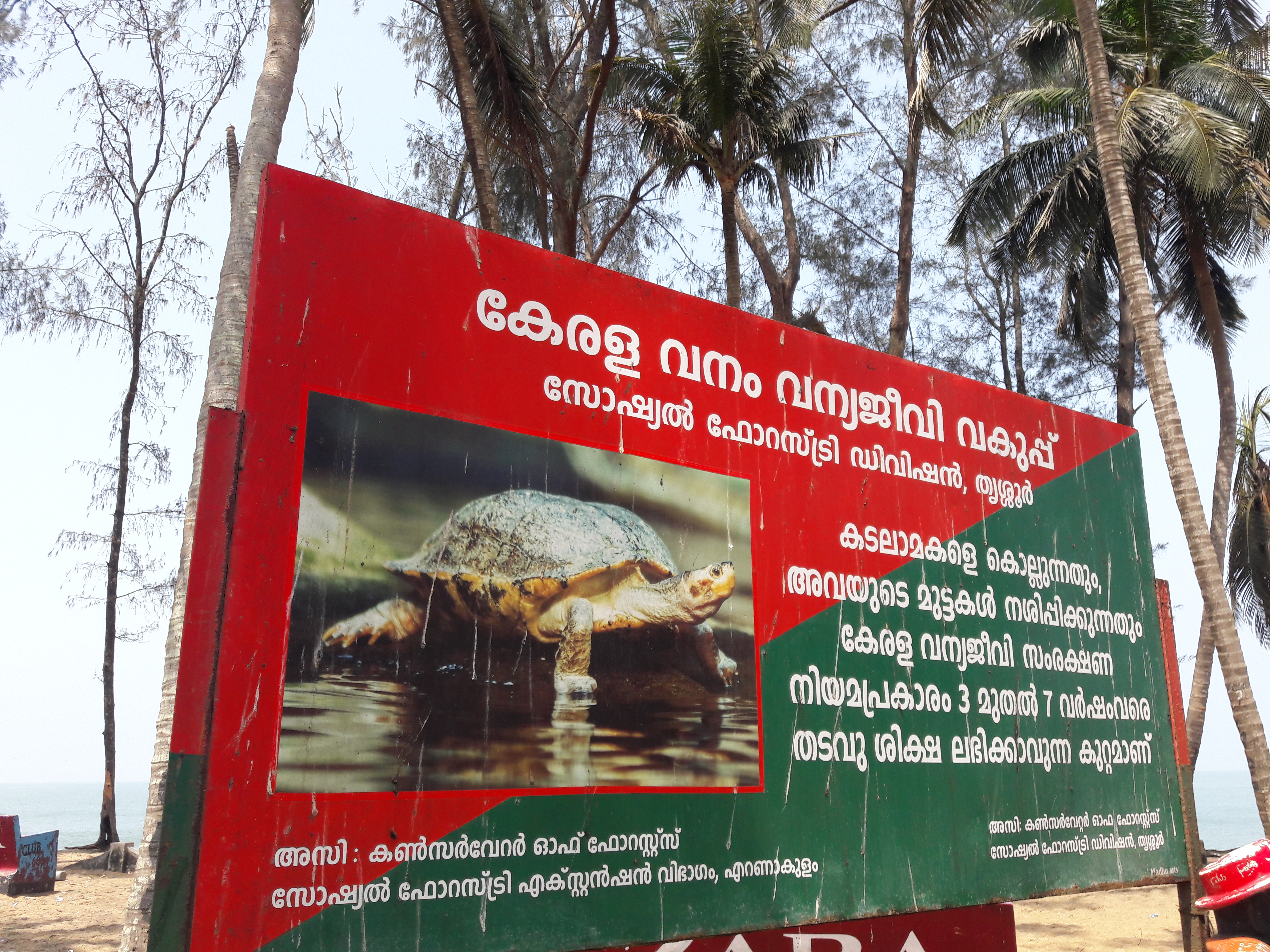 തൃശ്ശൂര്‍ ജില്ലയിലെ ചാവക്കാട് താലൂക്കിലെ പെരിയമ്പലം ബീച്ചില്‍ നാട്ടിവെച്ചിരിക്കുന്ന കടലാമ സംരക്ഷണവുമായി ബന്ധപ്പെട്ട സൂചനാ ഫലകം.